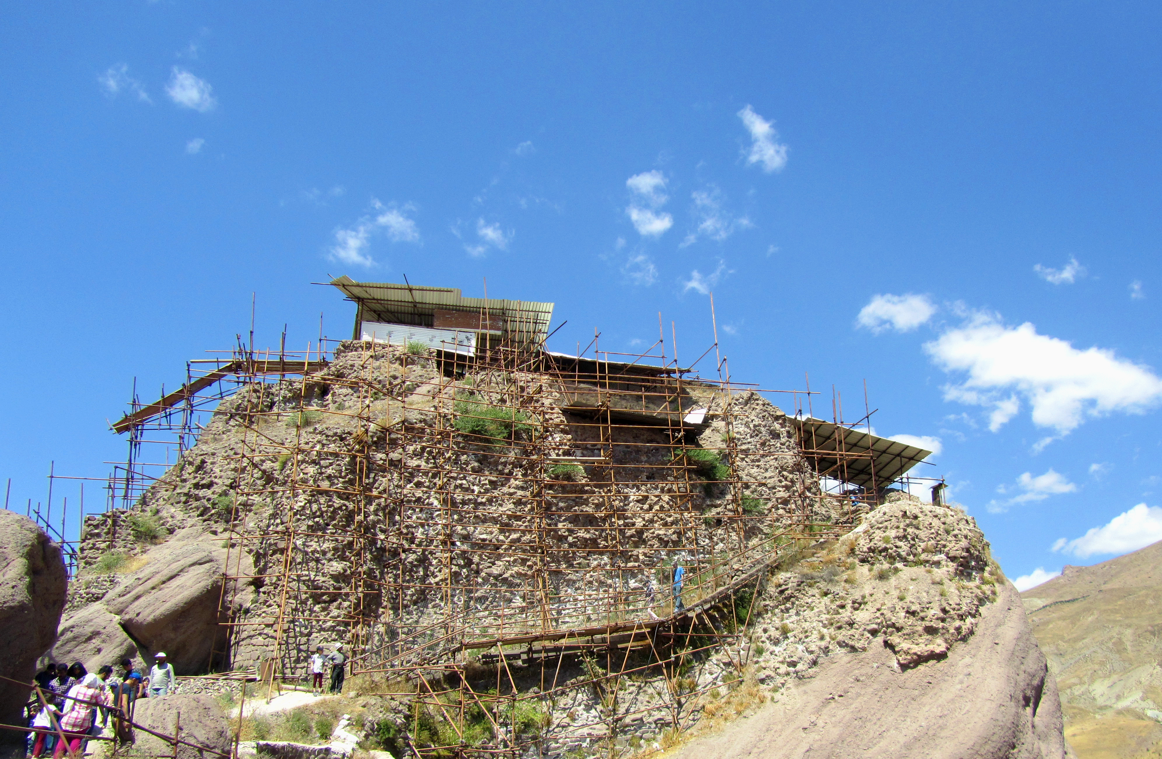 دژ حسن صباح (قلعه الموت)